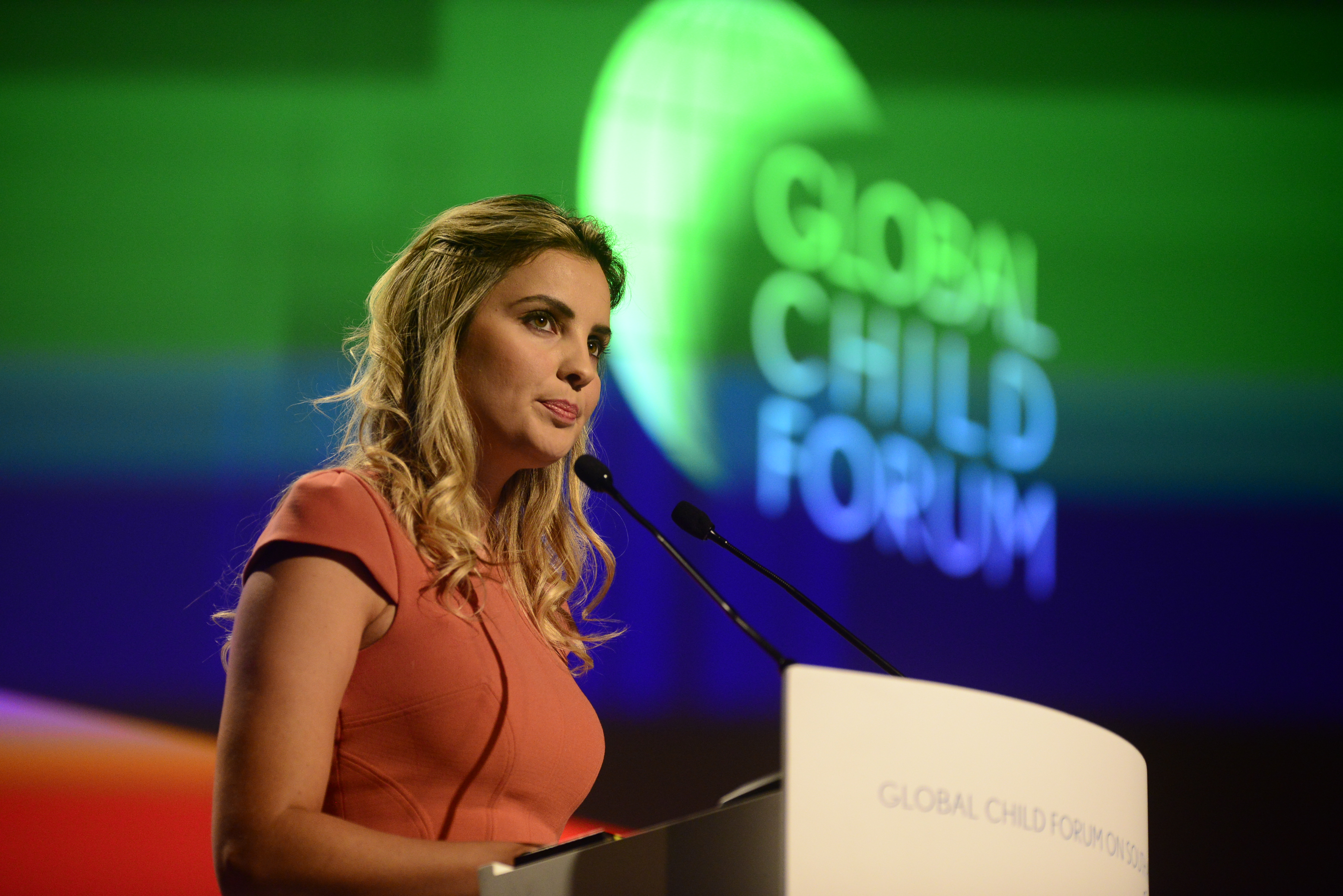 São Paulo (SP), 04/04/2017 - O ministro do Desenvolvimento Social e Agrário, Osmar Terra, acompanhou o presidente da República Michel Temer e a primeira-dama Marcela Temer no Global Child Forum, na sede da Fiesp. O rei da Suécia Carlos XVI Gustavo e a rainha Silvia da Suécia prestigiaram o evento, promovido pelo Unicef e pela Childhood Brasil - braço da World Childhood Foundation. No fórum, mais de 300 lideranças de empresas, governos, universidades e sociedade civil discutiram a garantia e a promoção dos direitos das crianças. Fotos: Mauro Vieira/MDSA